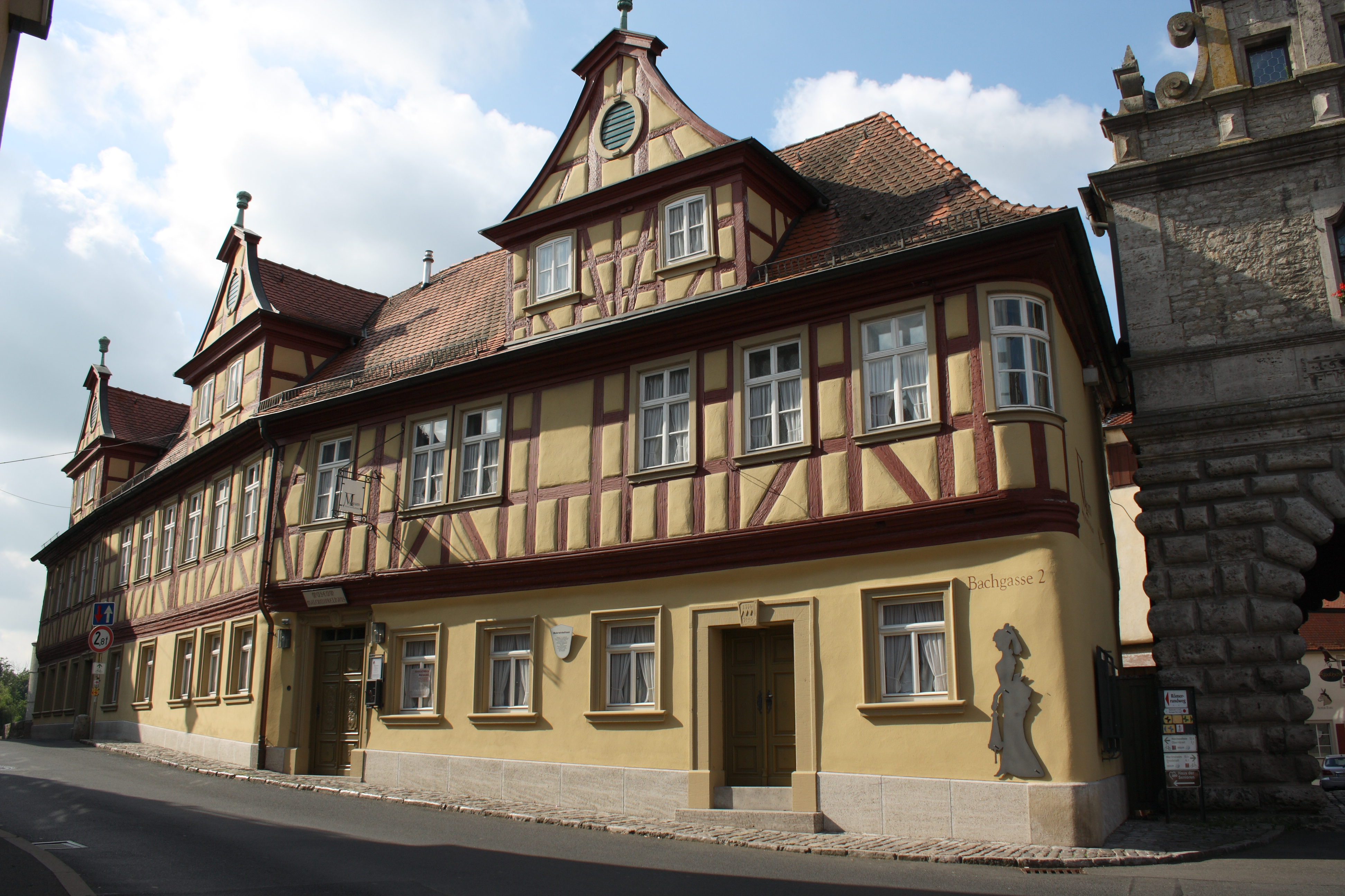 Fachwerkhaus Bachgasse 2 (heute Heimatmuseum) in Marktbreit Landkreis Kitzingen (Bayern)